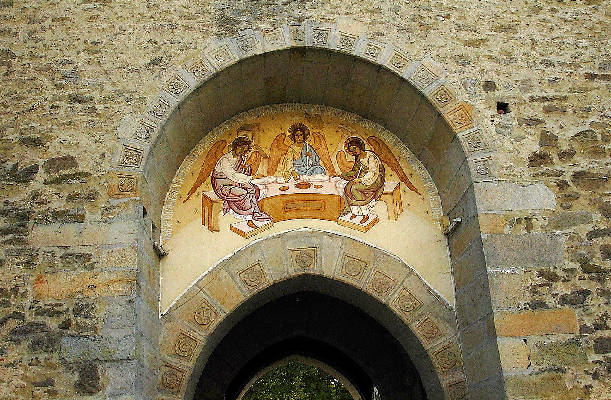 DRAGOMIRNA